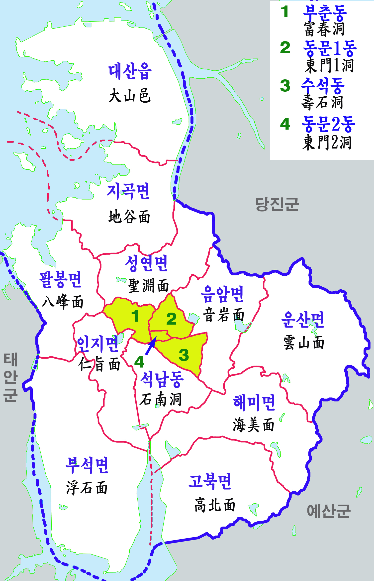 충남 서산시 행정구역도